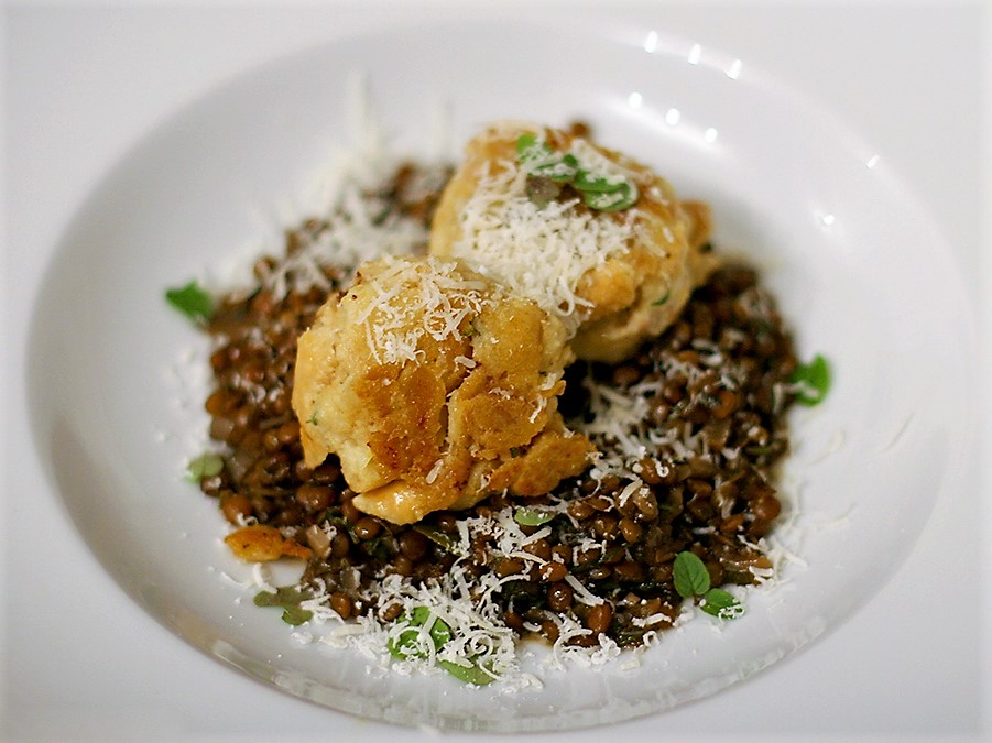 Brezelknödel mit Linsengemüse und geriebenem Käse.